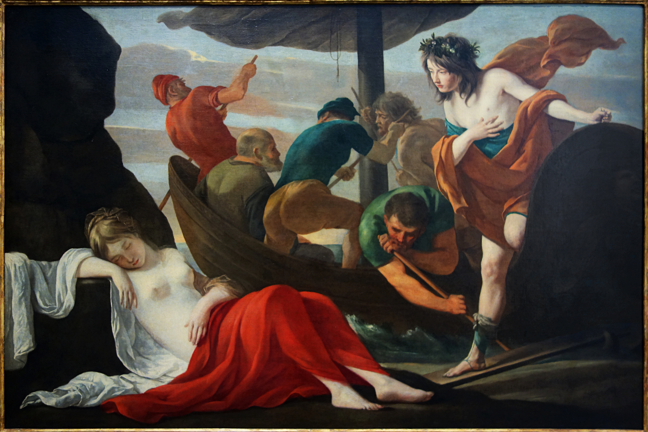 Bacchus et Ariane, au musée des beaux-arts d'Orléans.